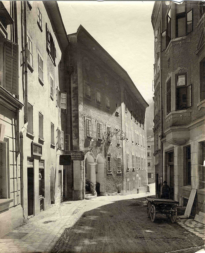 Salzburg, Altes Stieglbräu-Gasthaus, Gstättengasse